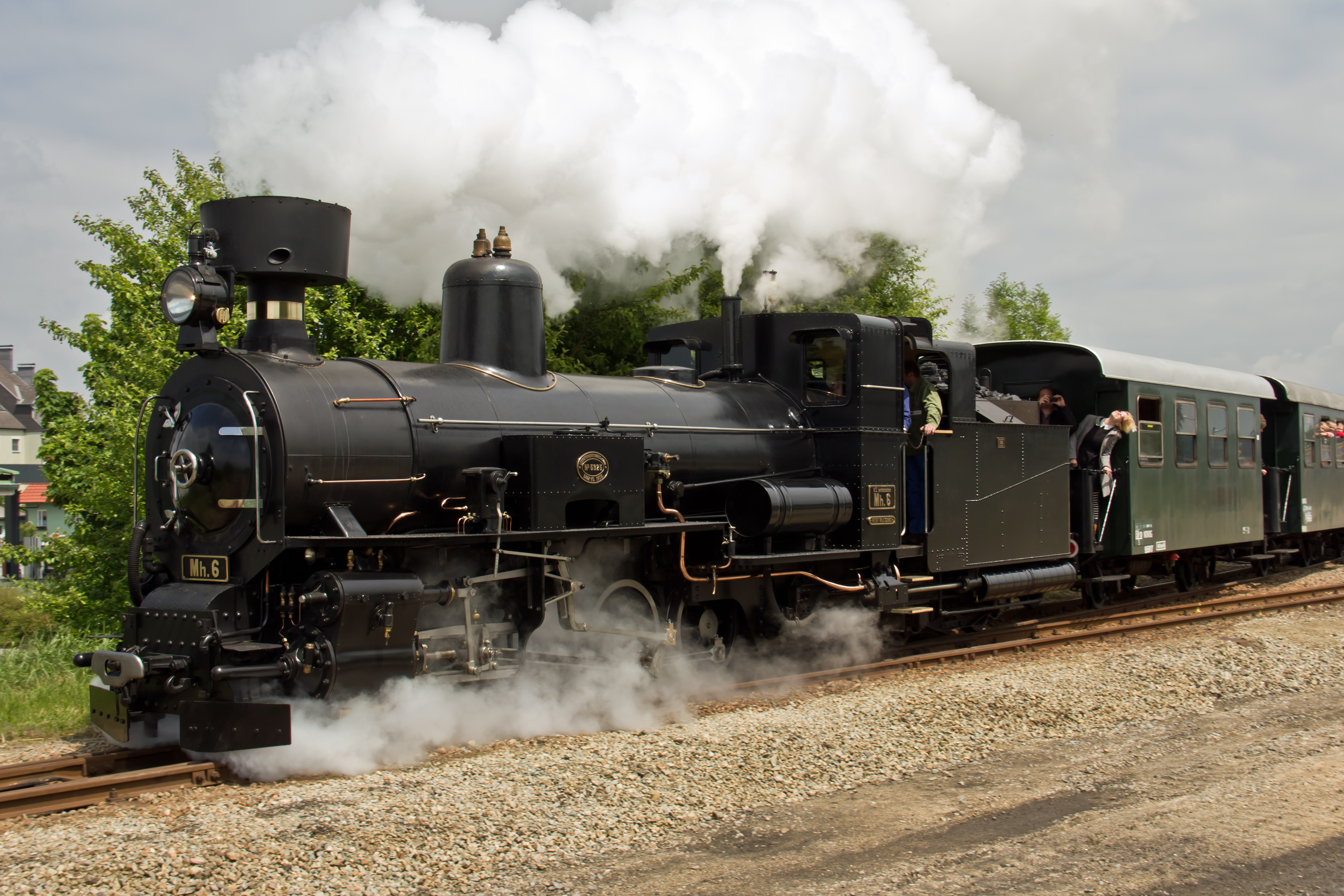 Am 25. Mai 2013 war die 399.06 der Mariazellerbahn als Ersatz für die zur Zeit bei einer Generalsanierung befindlichen 399.01 in Gmünd.